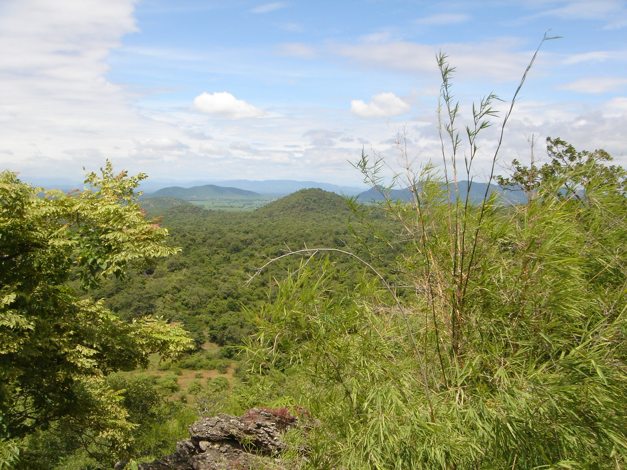 จุดชมวิวบนป่าพุหางนาคปลายฤดูฝน วนอุทยานแห่งชาติพุม่วง, view at Phu Hang Nak, U Thong District